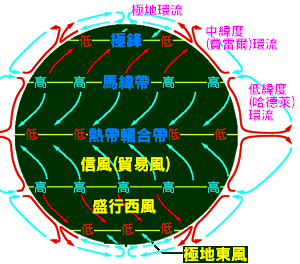 中文（台灣）: 大氣環流。大氣環流圖，顯示低緯度、中緯度、極地環流，以及它們之間空氣上升與沉降區域。